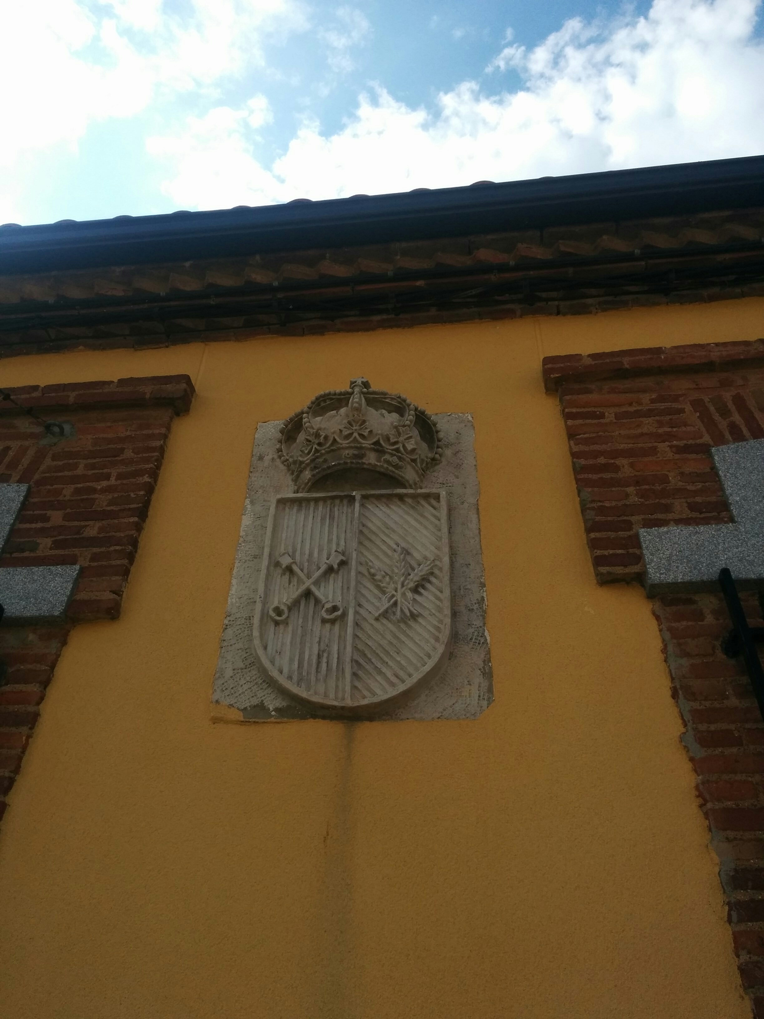 Representación en piedra del escudo de San Pedro Bercianos, provincia de León, expuesto en el ayuntamiento del mismo pueblo.